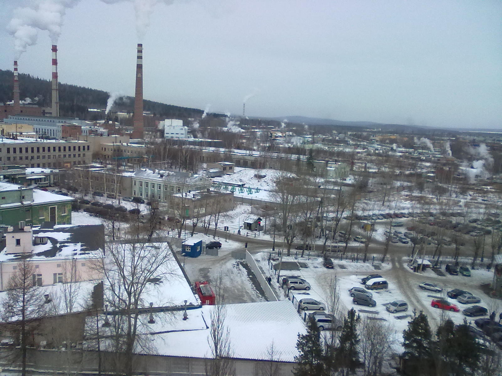 Novouralsk, Sverdlovsk Oblast, Russia